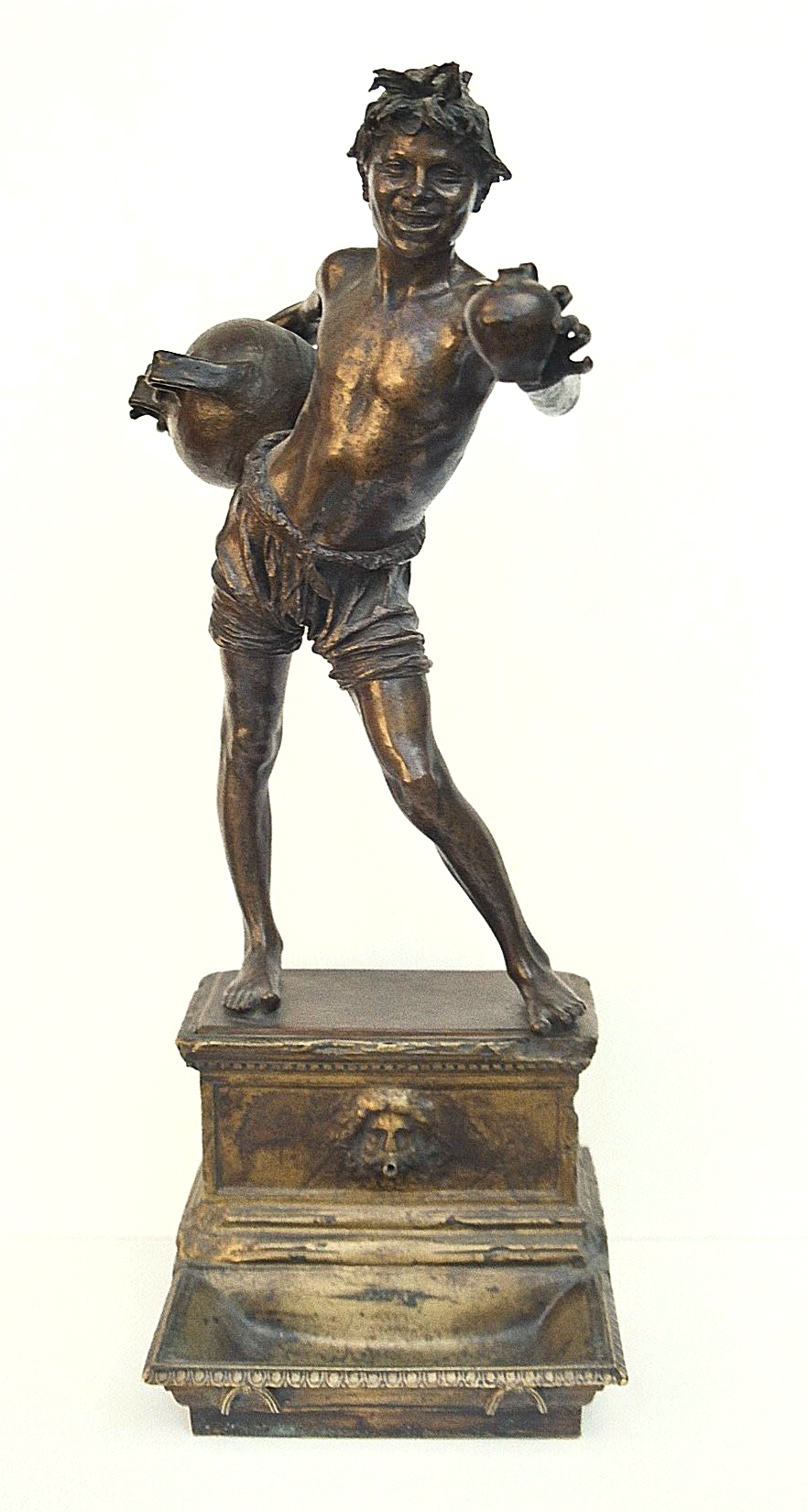 Vincenzo Gemito (1852-1929), Fontana dell'Acquaiolo. Bronzo. Museo Michelangiolesco, Caprese Michelangelo (AR)